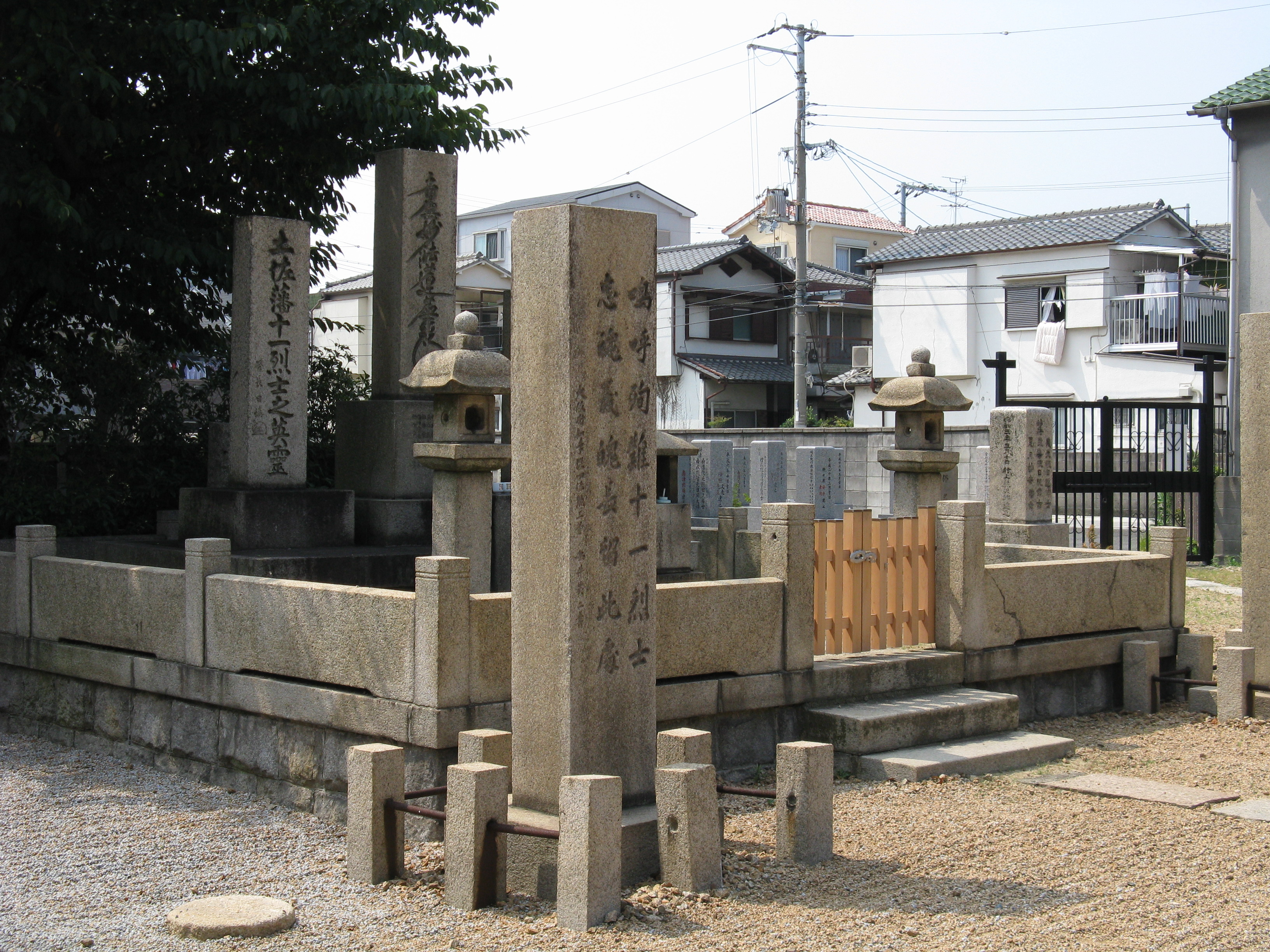 妙國寺 土佐藩士供養塔